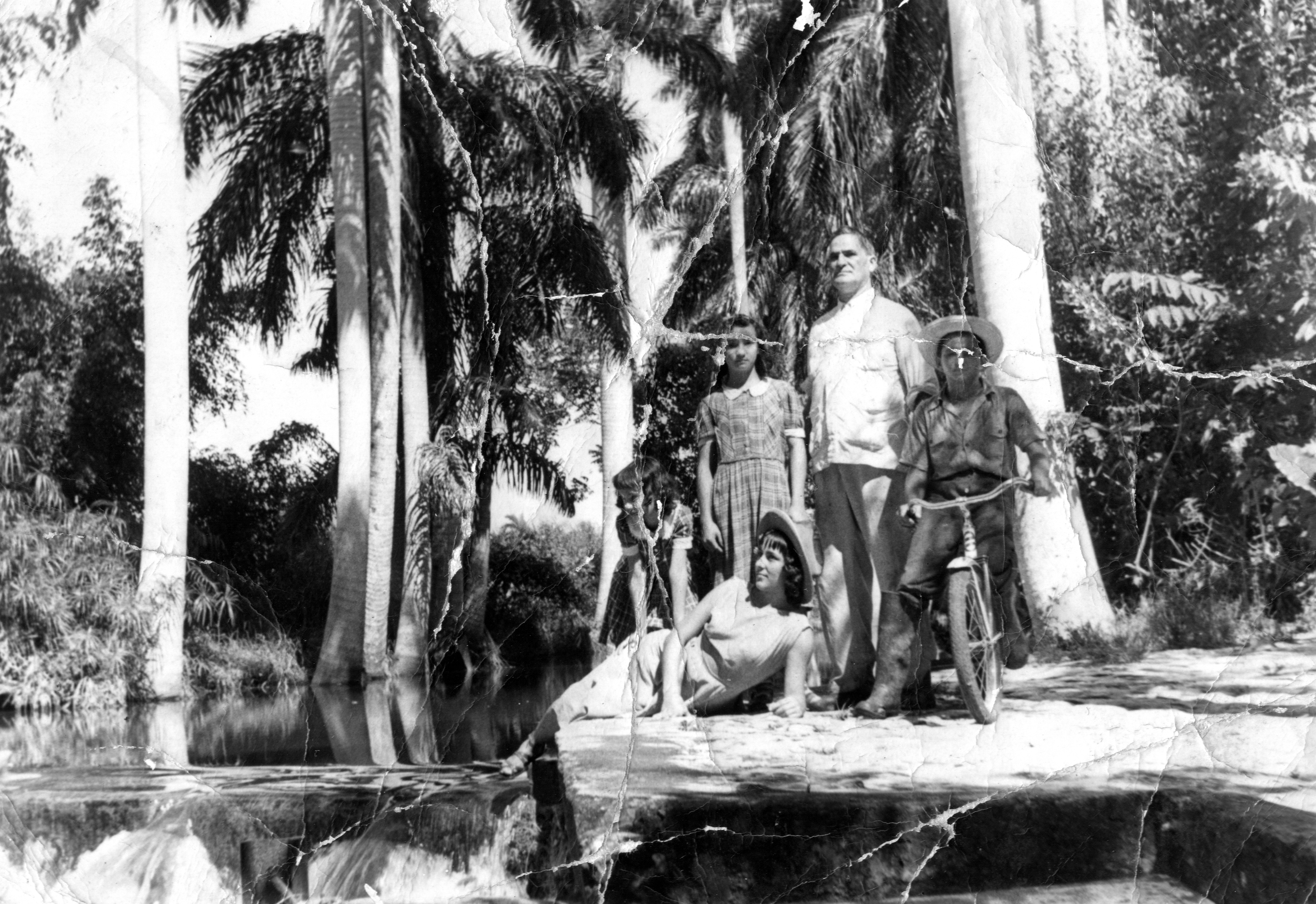 Vista del río Naranjo, Guayacanes, Cuba años 1930, en la finca de Miguel Morffi de ascendencia irlandesa (Miguel al centro de la foto con su nieta Mirtha Alonso Morffi parada a su lado). Foto donada por Mirtha Alonso Morffi